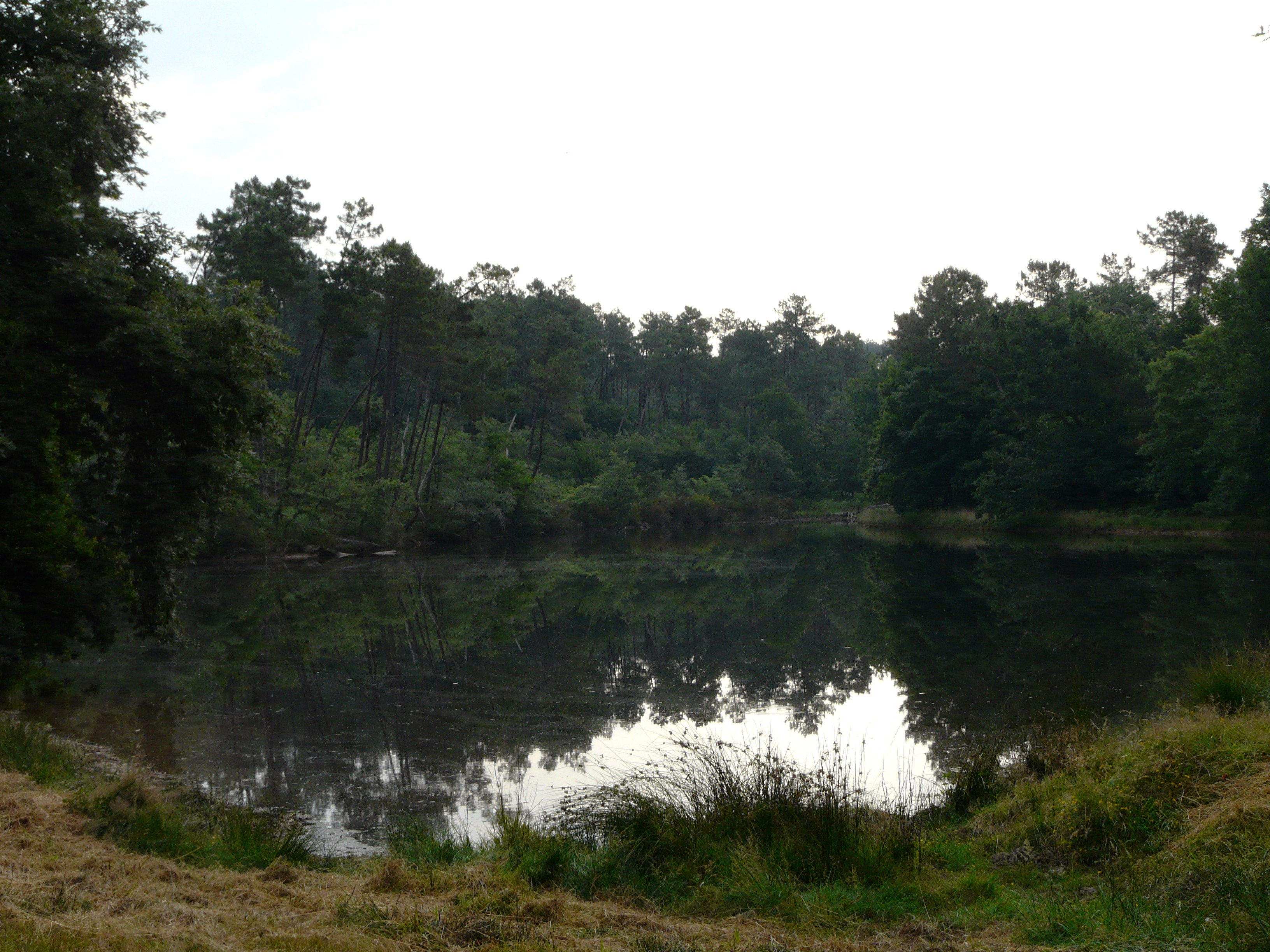 L'étang d'Ataux en forêt de la Double, Saint-Jean-d'Ataux, Dordogne, France.